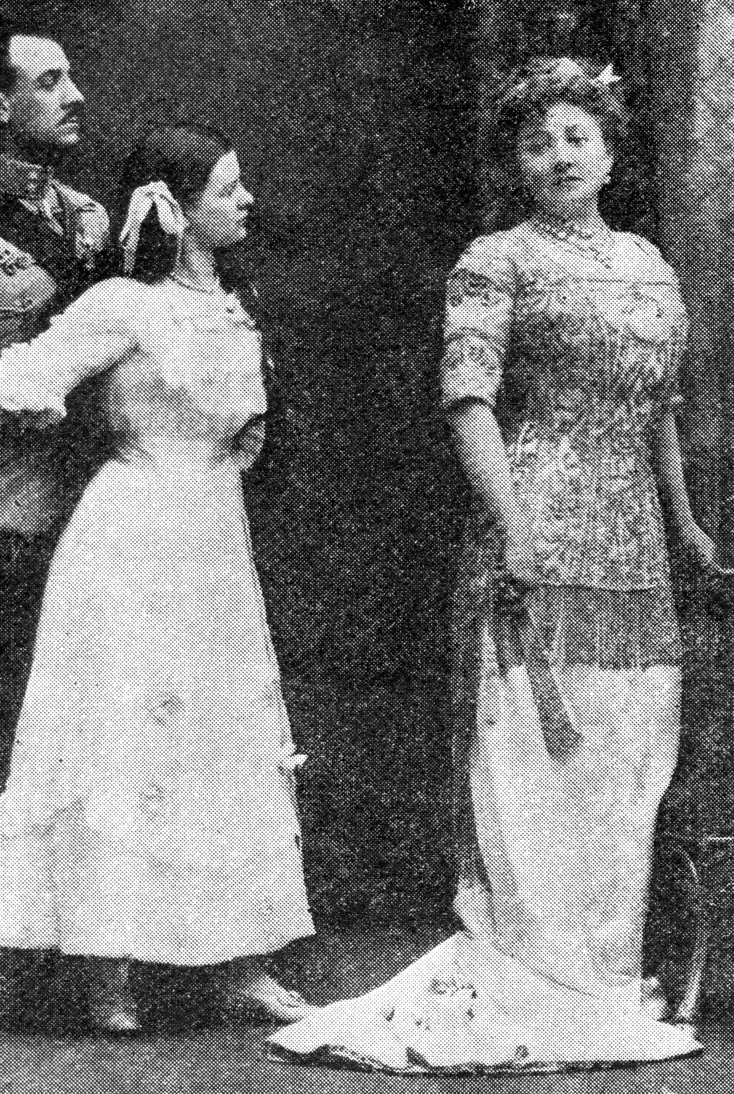 Władysław Szczawiński, Janina Janecka i Wiktoria Kawecka w Manewrach jesiennych